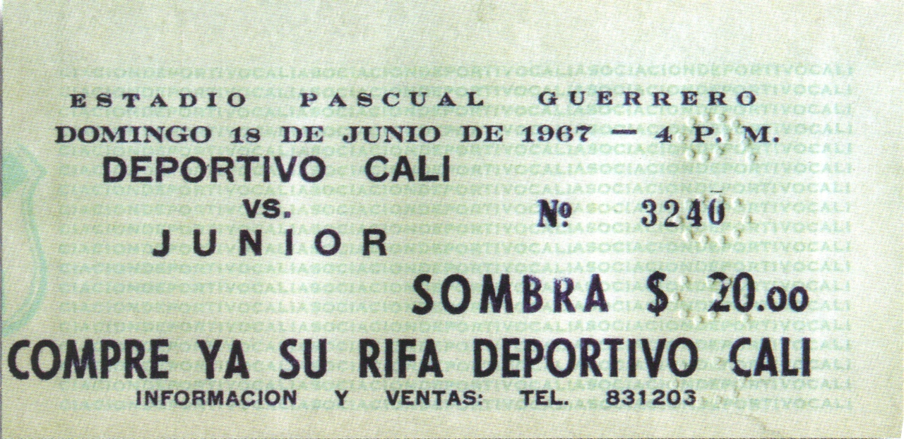 Boleta para el partido entre Deportivo Cali y Junior